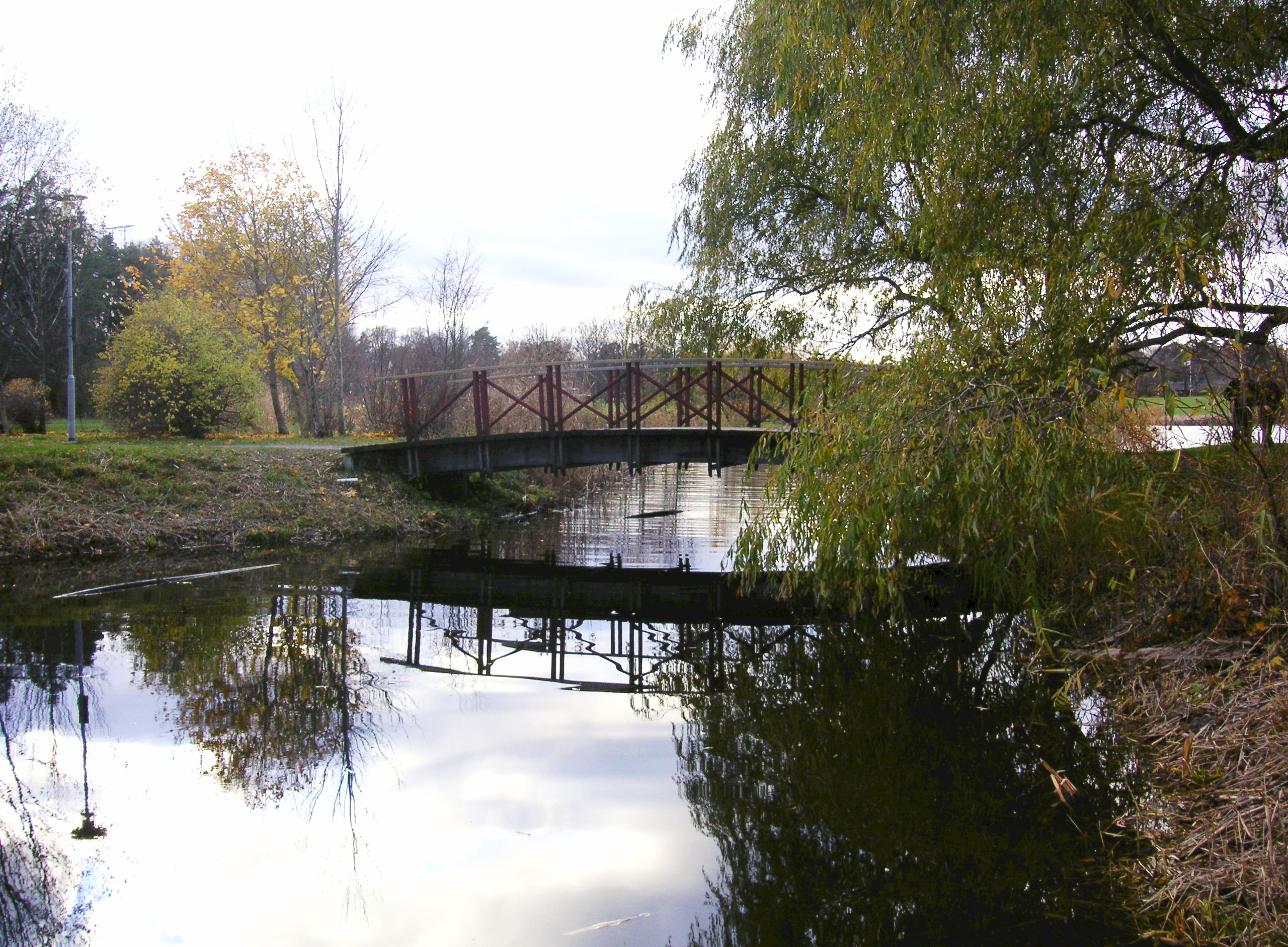 Spegeldammen även Solfångardammen på Norra Djurgården i Stockholm, här låg en gång Stora Skuggans skjutbanor